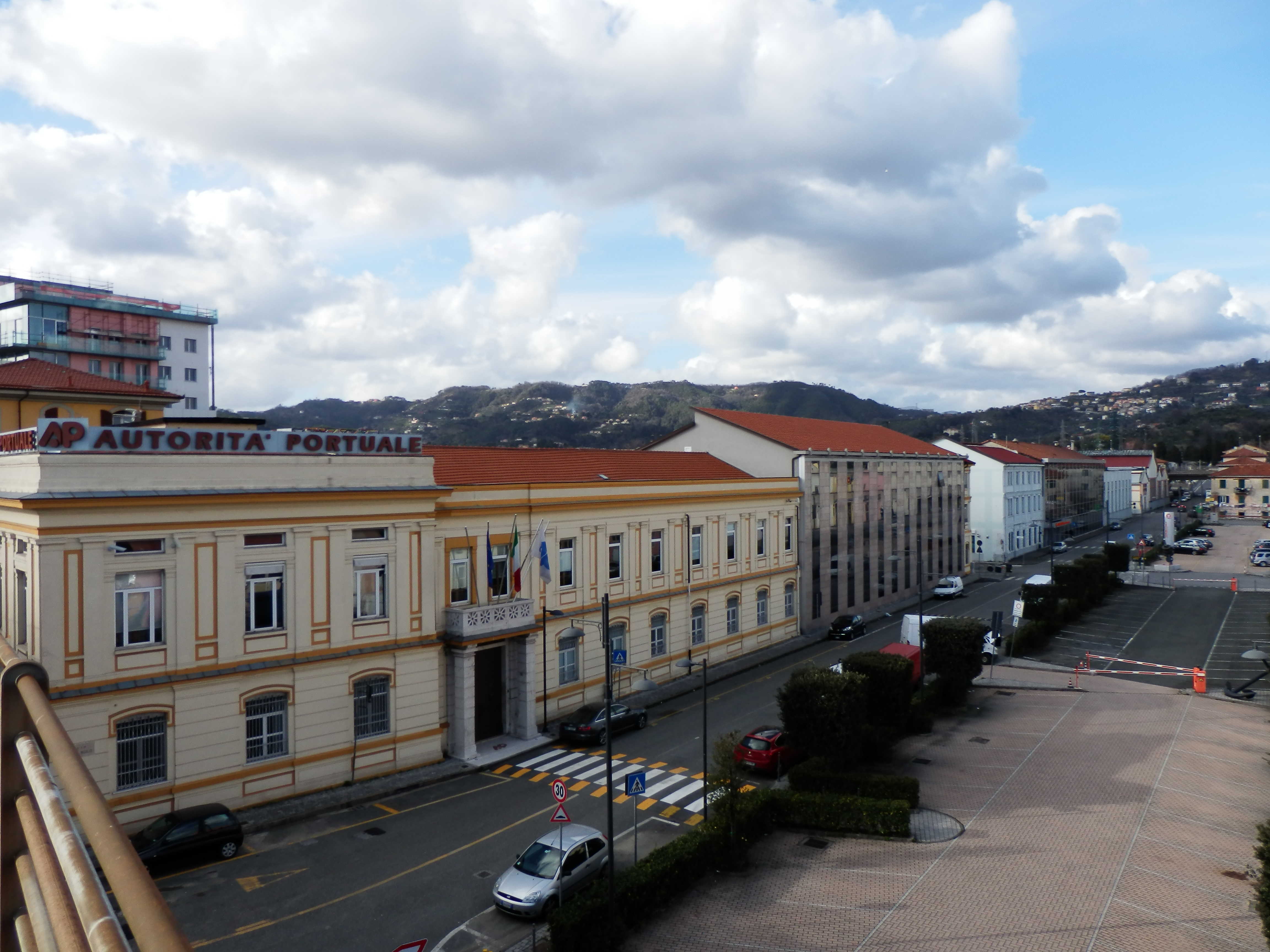 Palazzo dell'Autorità Portuale, La Spezia.